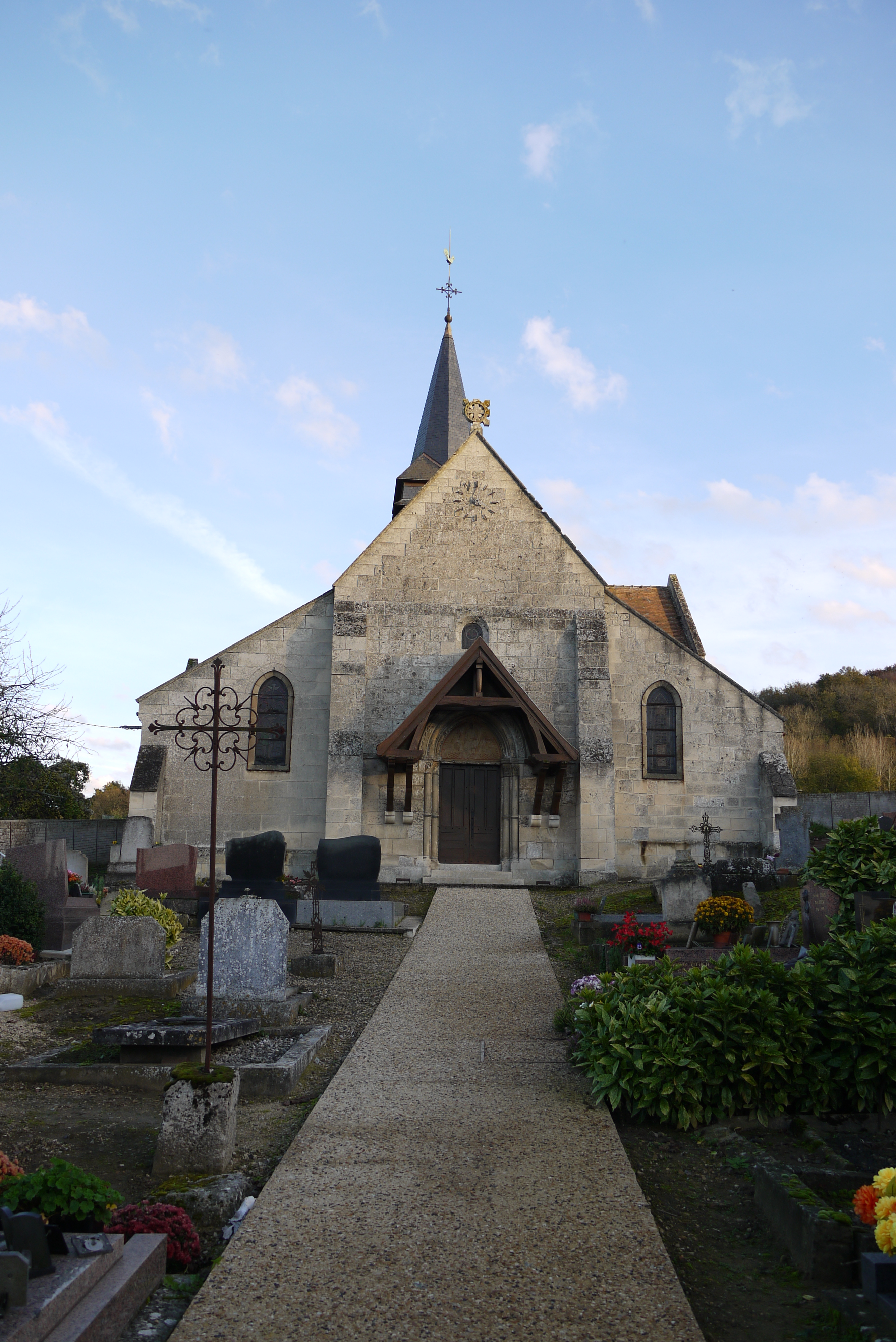 Église Saint-Rémy d'Augy